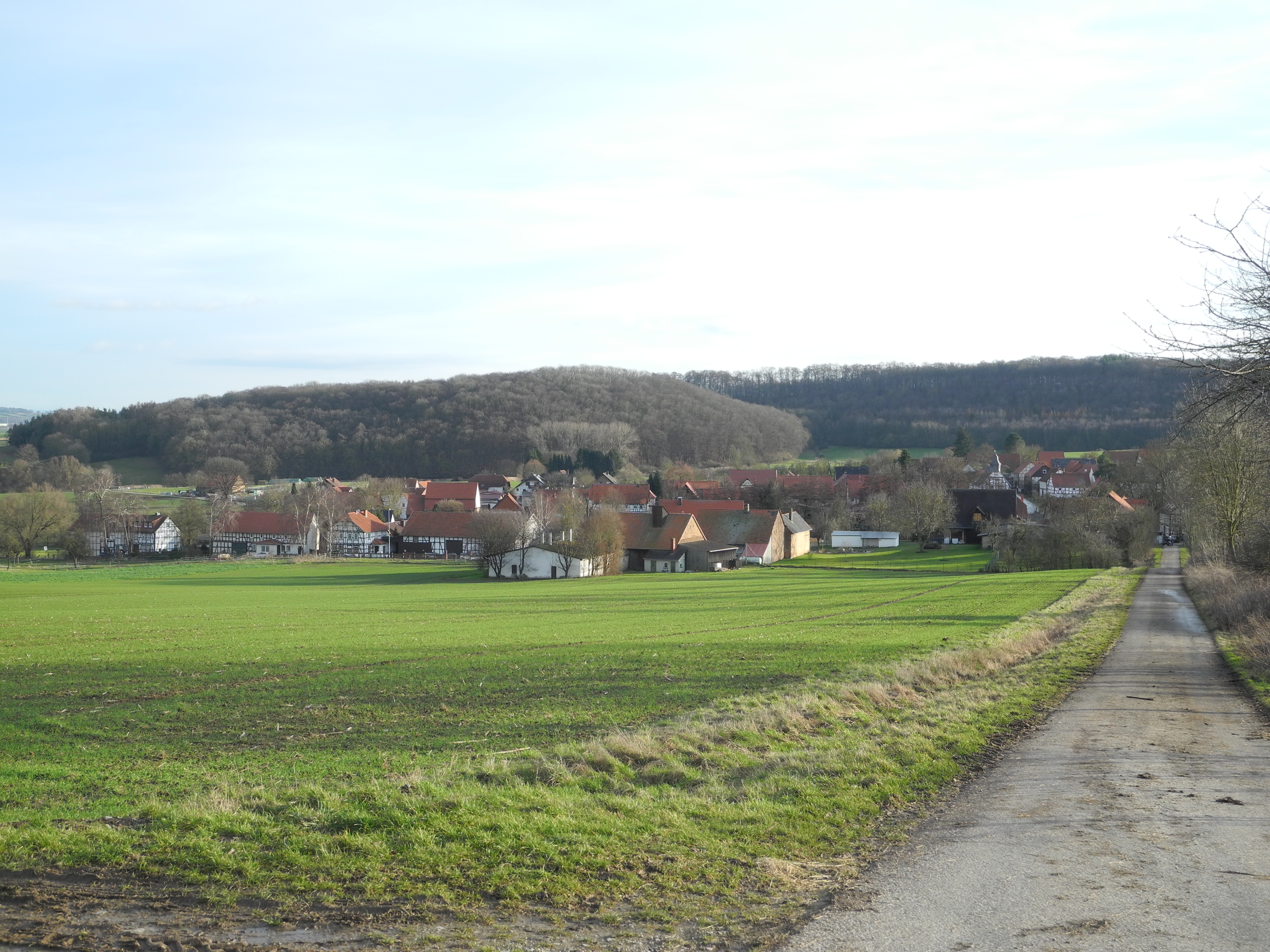 Kelze, ein Stadtteil von Hofgeismar, Hessen, Deutschland. Blick von Nordwesten.